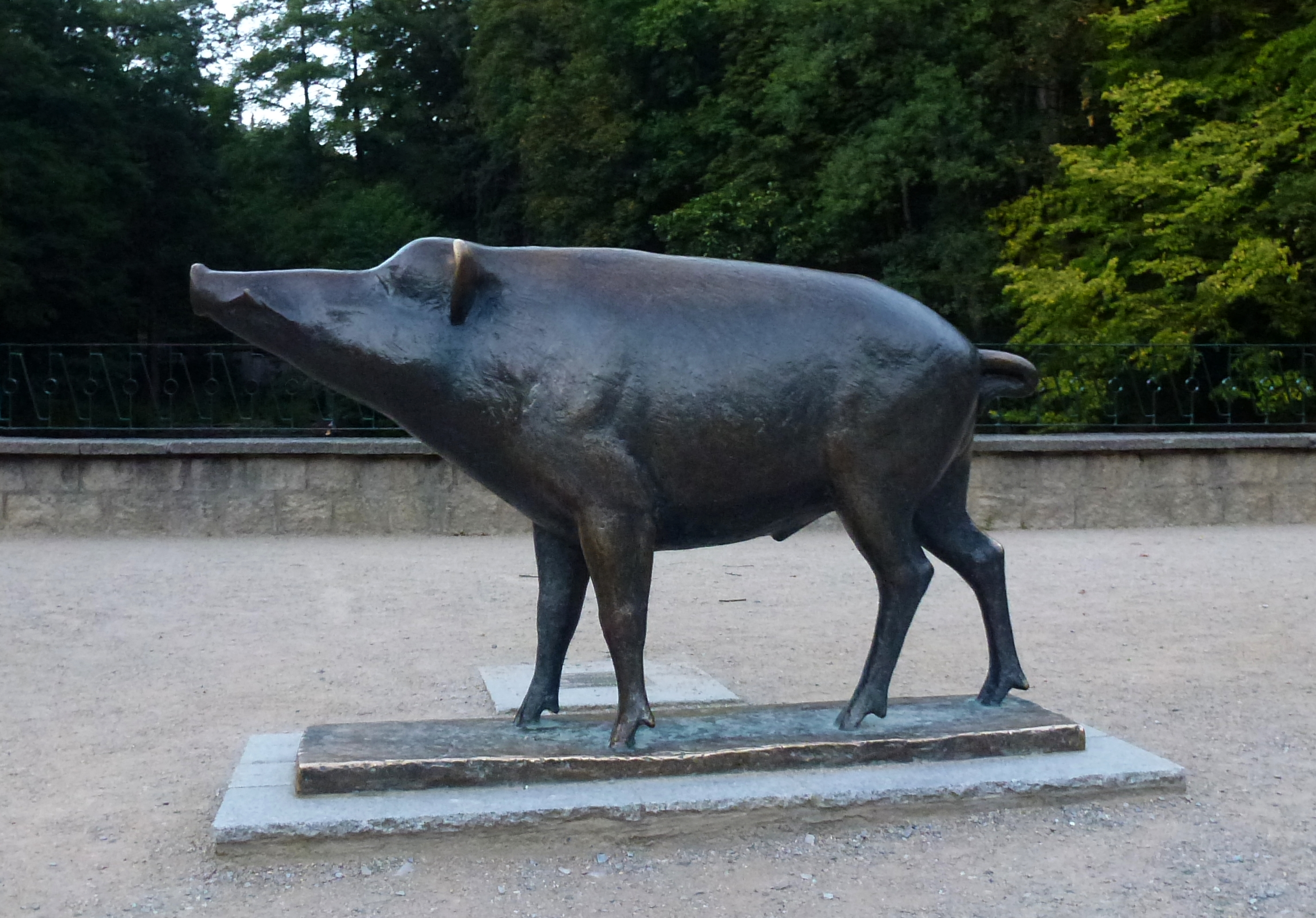 Wildschwein-Plastik, erschaffen aus Kunststoffbeton von Bildhauer Dieter Borchardt (nicht Borchert) aus Magdeburg. 1983 Schenkung an die Stadt Wernigerode durch Herta und Ernst Loops. Nach Beschädigung im Dezember 2003 Kopie durch Bronzeabguss erstellt, am 9 Oktober 2004 zum 30jährigen Bestehen des Wildparks neu aufgestellt.